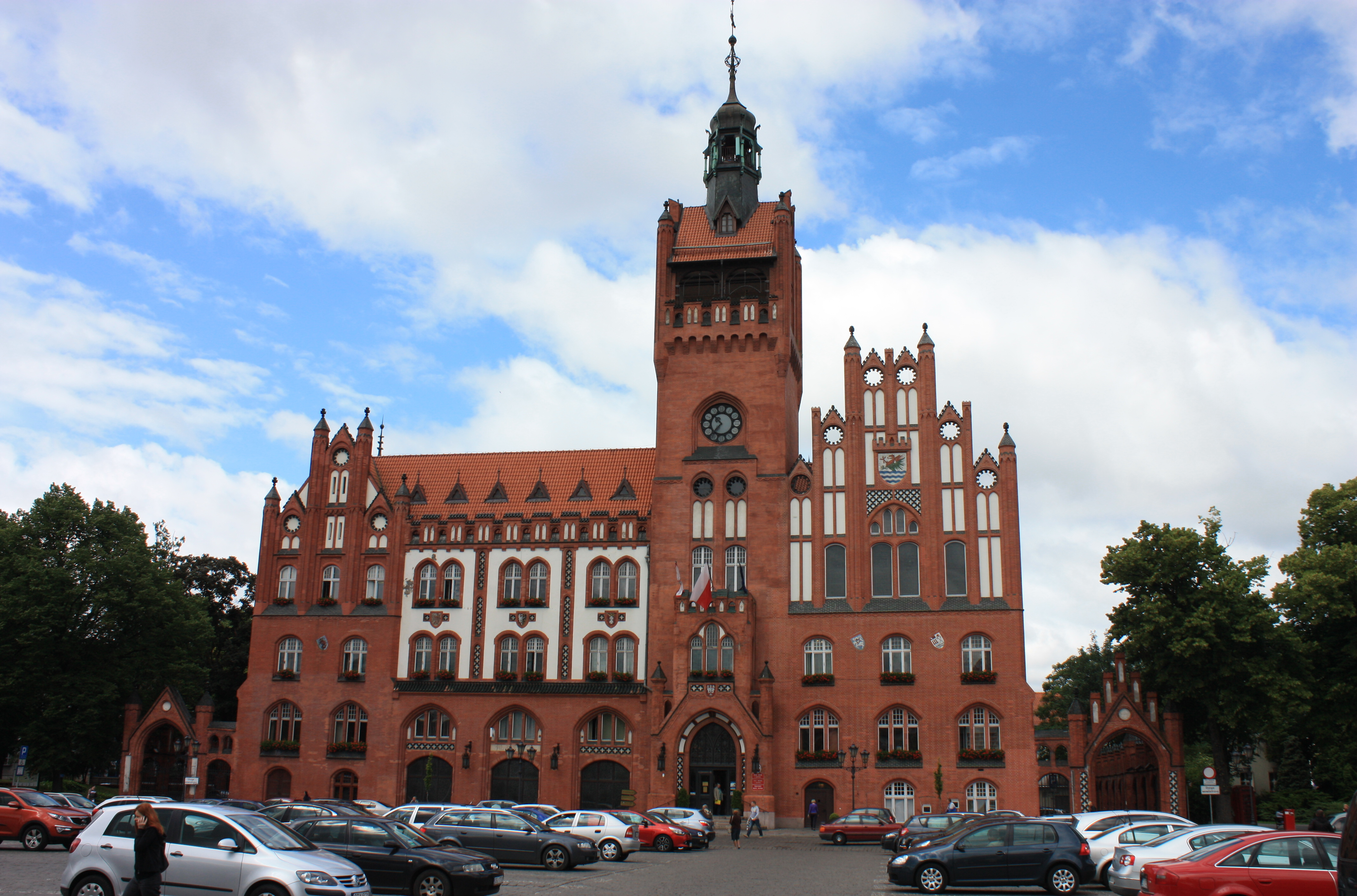 Słupsk, ratusz, 1899-1901